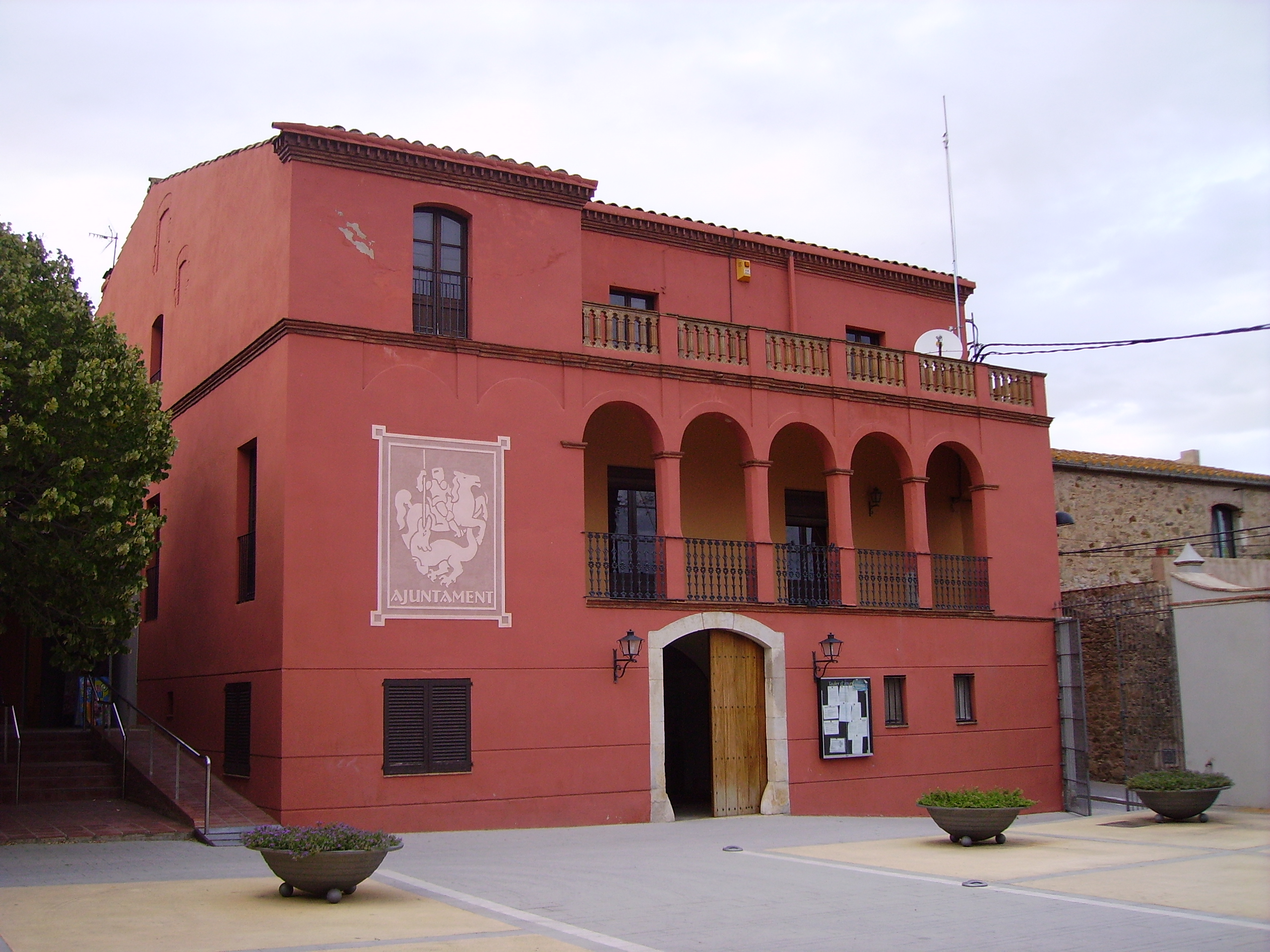 Ajuntament de Sant Jordi Desvalls, Gironès, Catalunya.